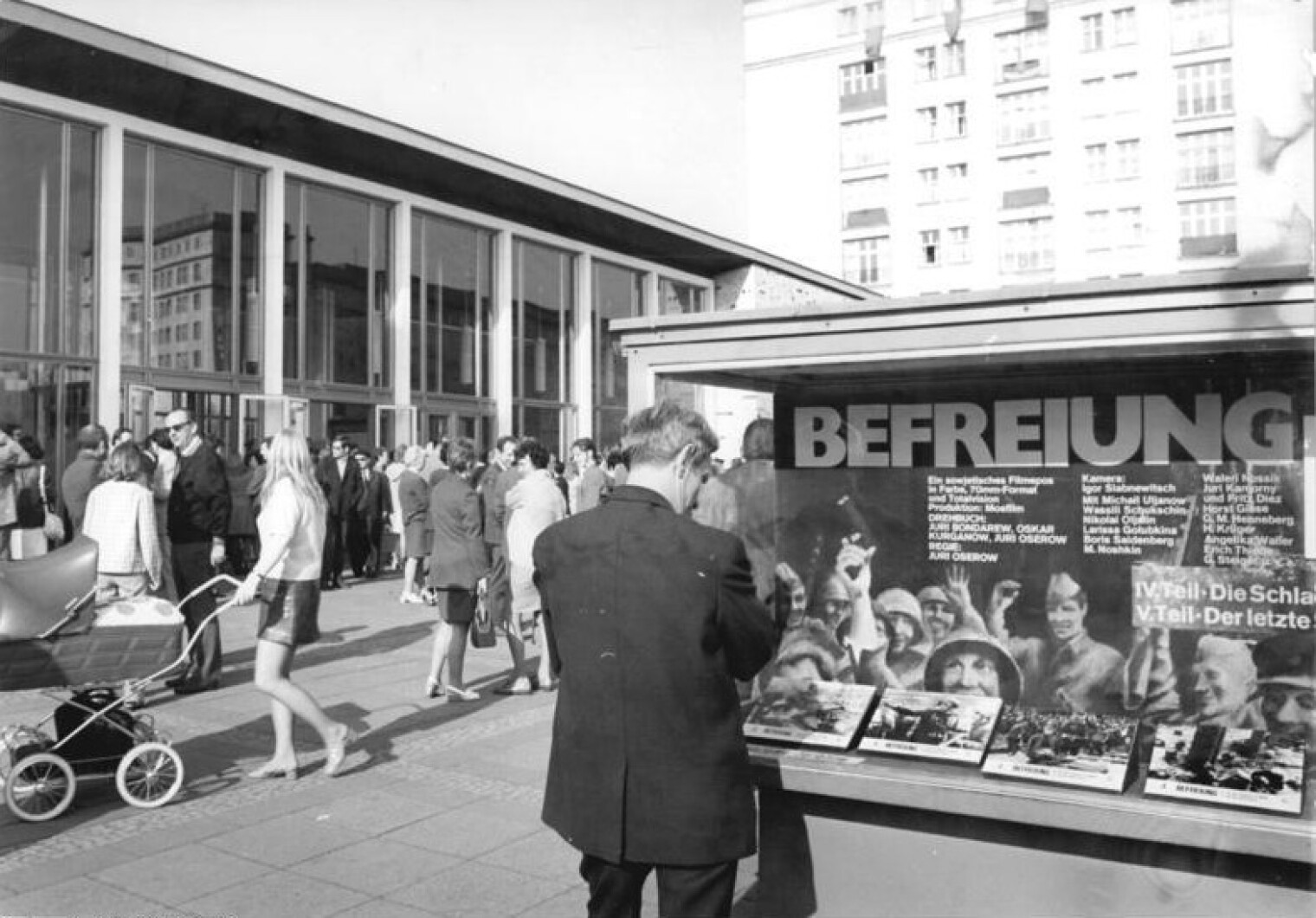 Berlin, Karl-Marx-Allee, Kino "International" ADN-ZB Spremberg 8.5.72 Berlin: Filmepos Befreiung erlebte Premiere - Die letzten beiden Teile des sowjetischen Filmepos Befreiung erlebten am 8.5.72 im Berliner Filmtheater Kosmos die DDR-Premiere. Die ersten drei Teile des Epos sahen bisher über 6,5 Millionen Zuschauer.